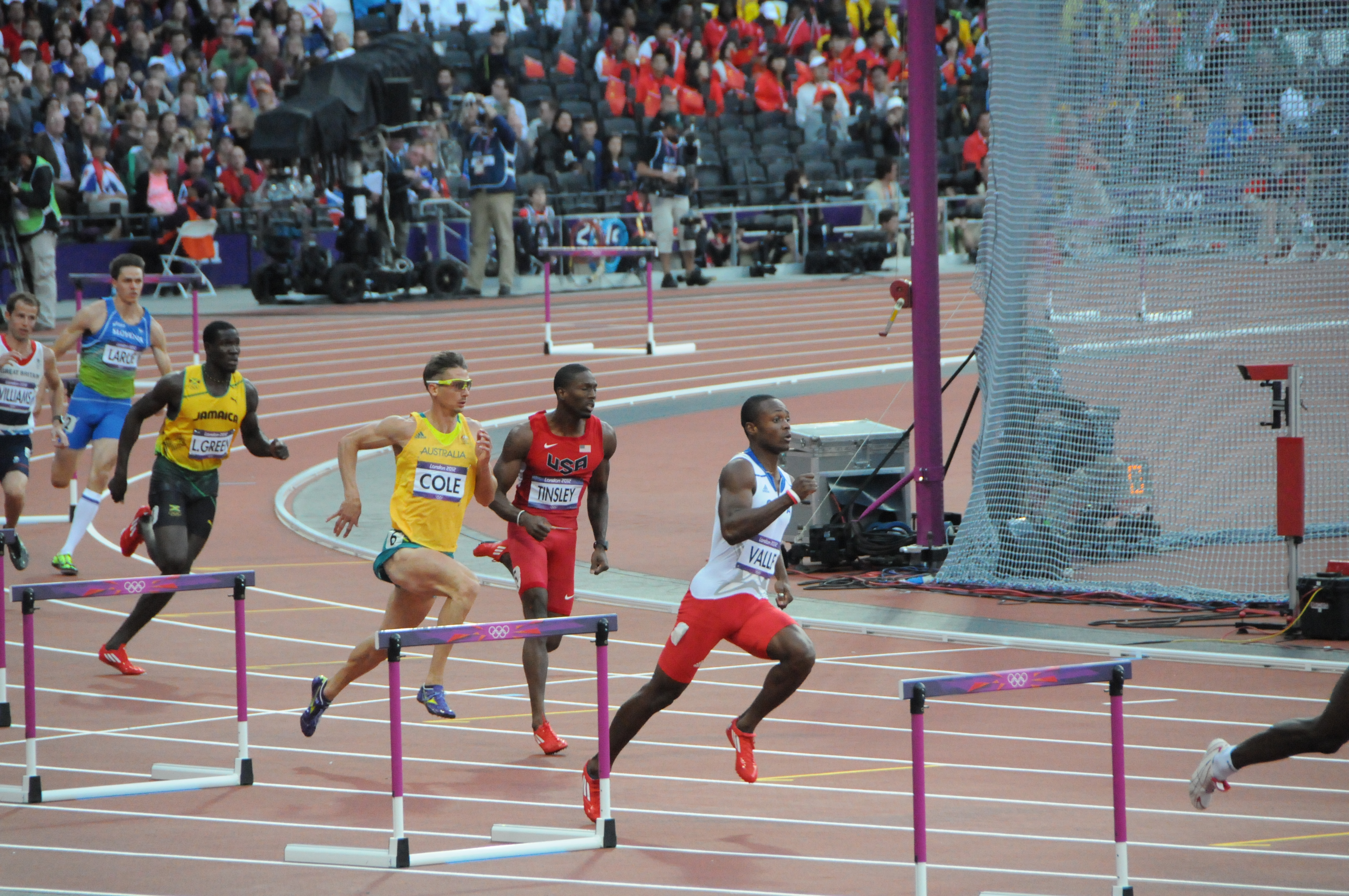 3ème demi finale du 400 haies aux JO 2012 gagné par l'américain Michael Tinsley.